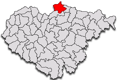 Categorie:Hărţi ale judeţului Sălaj